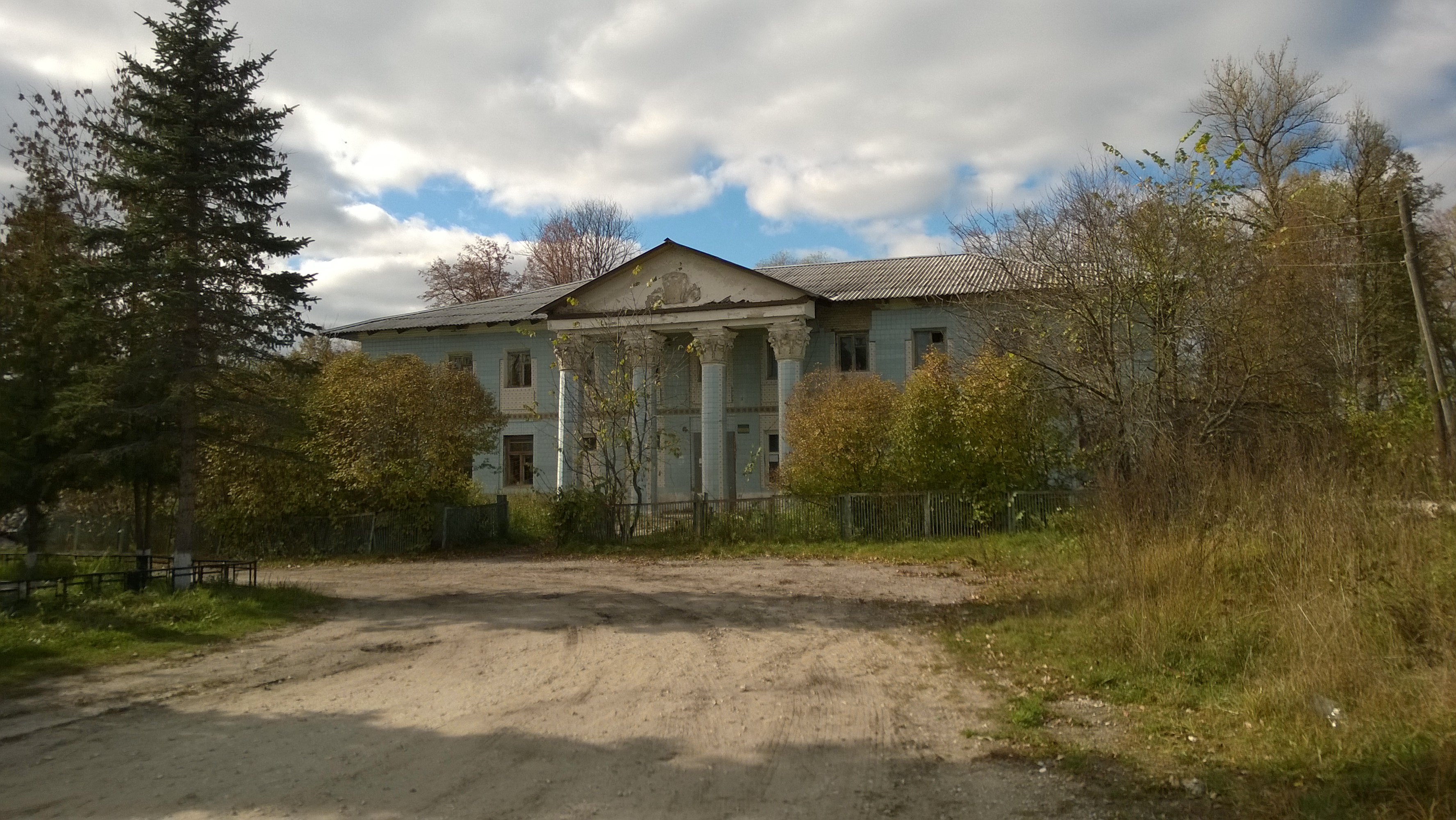 Усадебный дом N 1: Воспушка, Петушинский район, Владимирская область